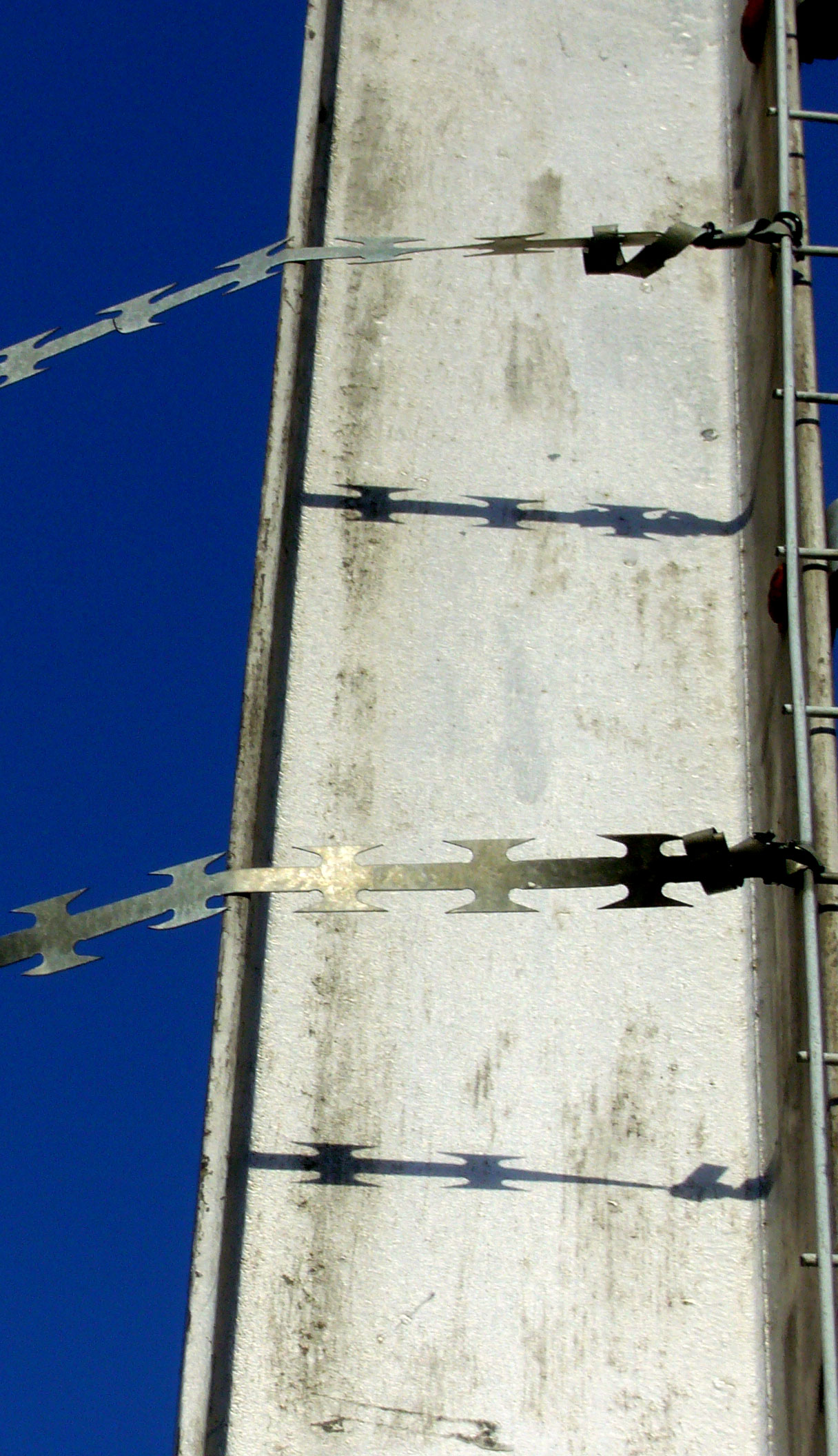 Pickege Flaachdrot